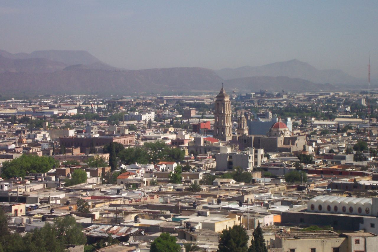 Saltillo,_mexico(3)